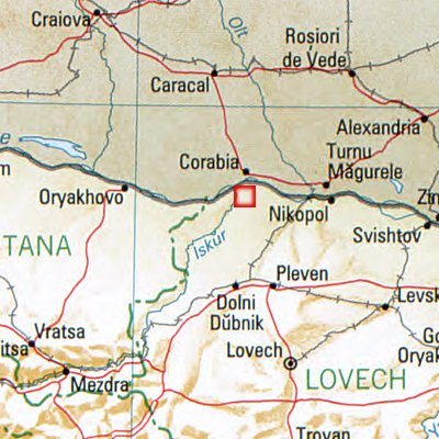 Colonia Ulpia Oescus- Lage des Ortes in Bulgarien